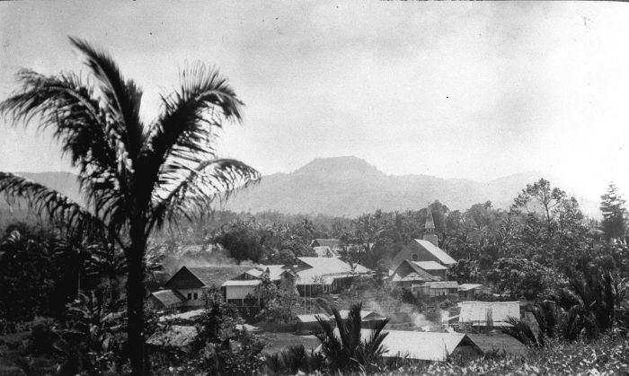 Foto. Een stadsgezicht van Tomohon, van bovenaf gezien